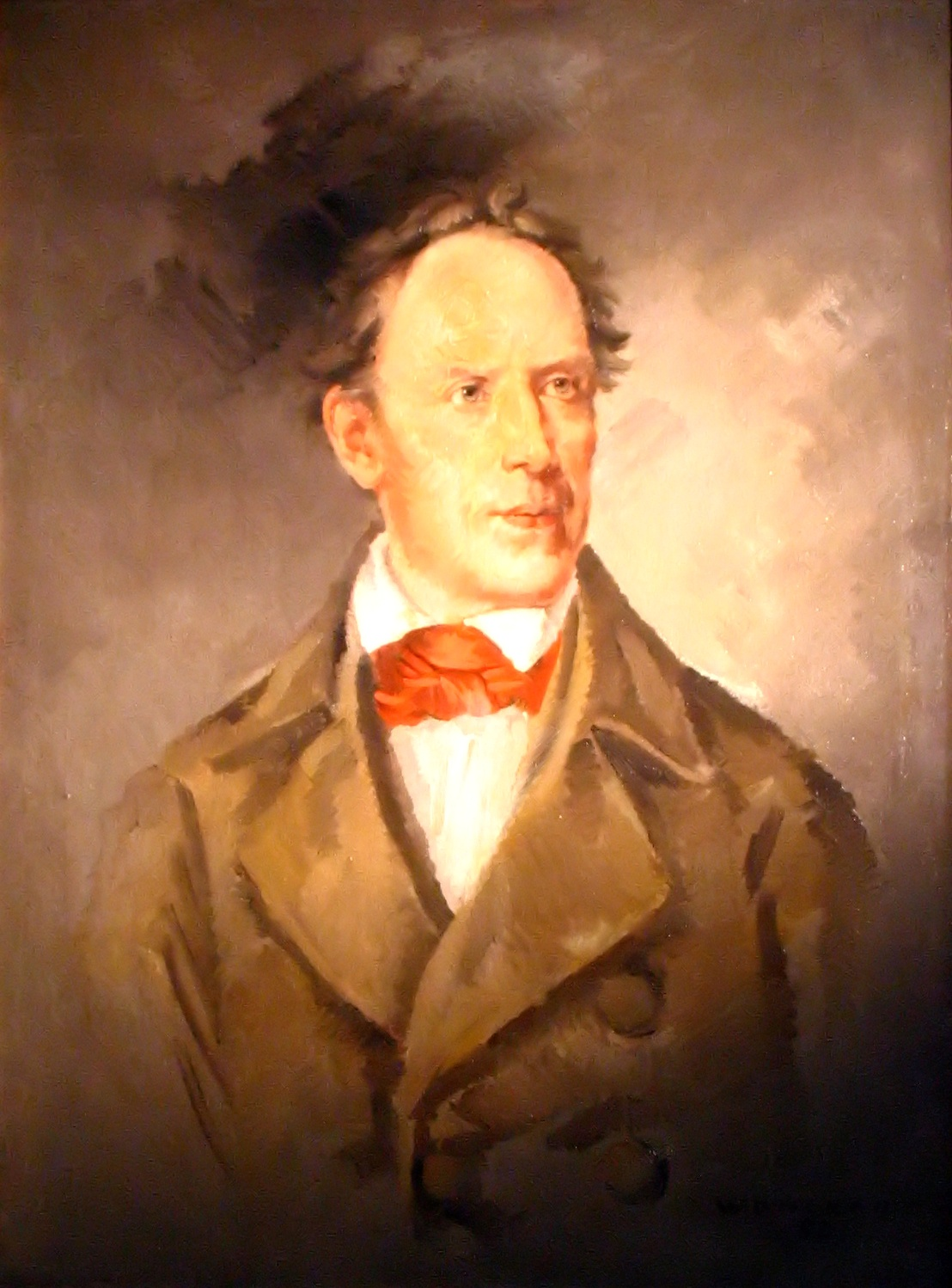 Johann Andreas Schmeller, Portrait, Tirschenreuther MuseumsQuartier